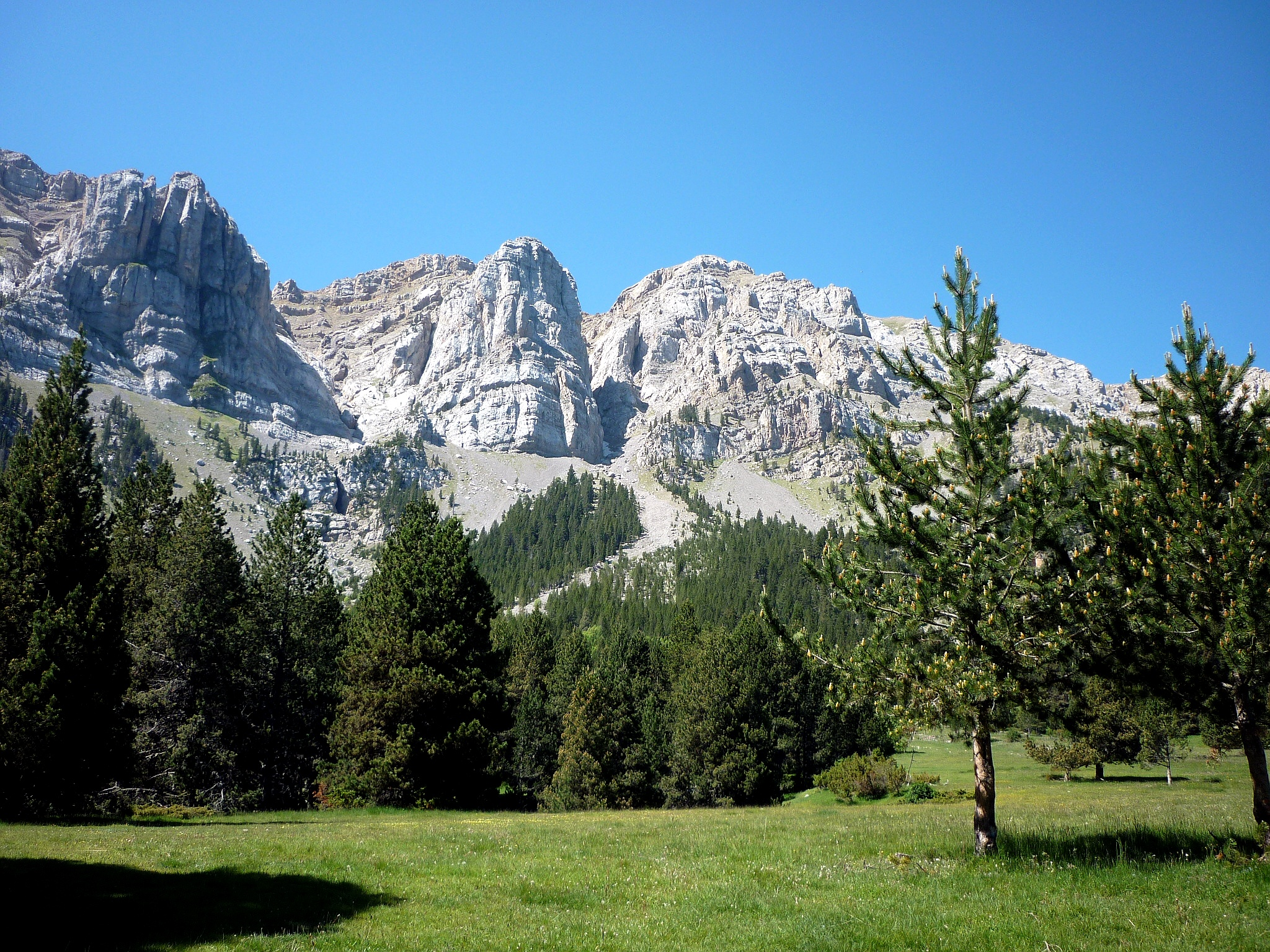 Prat de Cadí (Montellà i Martinet - Baixa Cerdanya) This is a a photo of a natural area in Catalonia, Spain, with id: ES510202